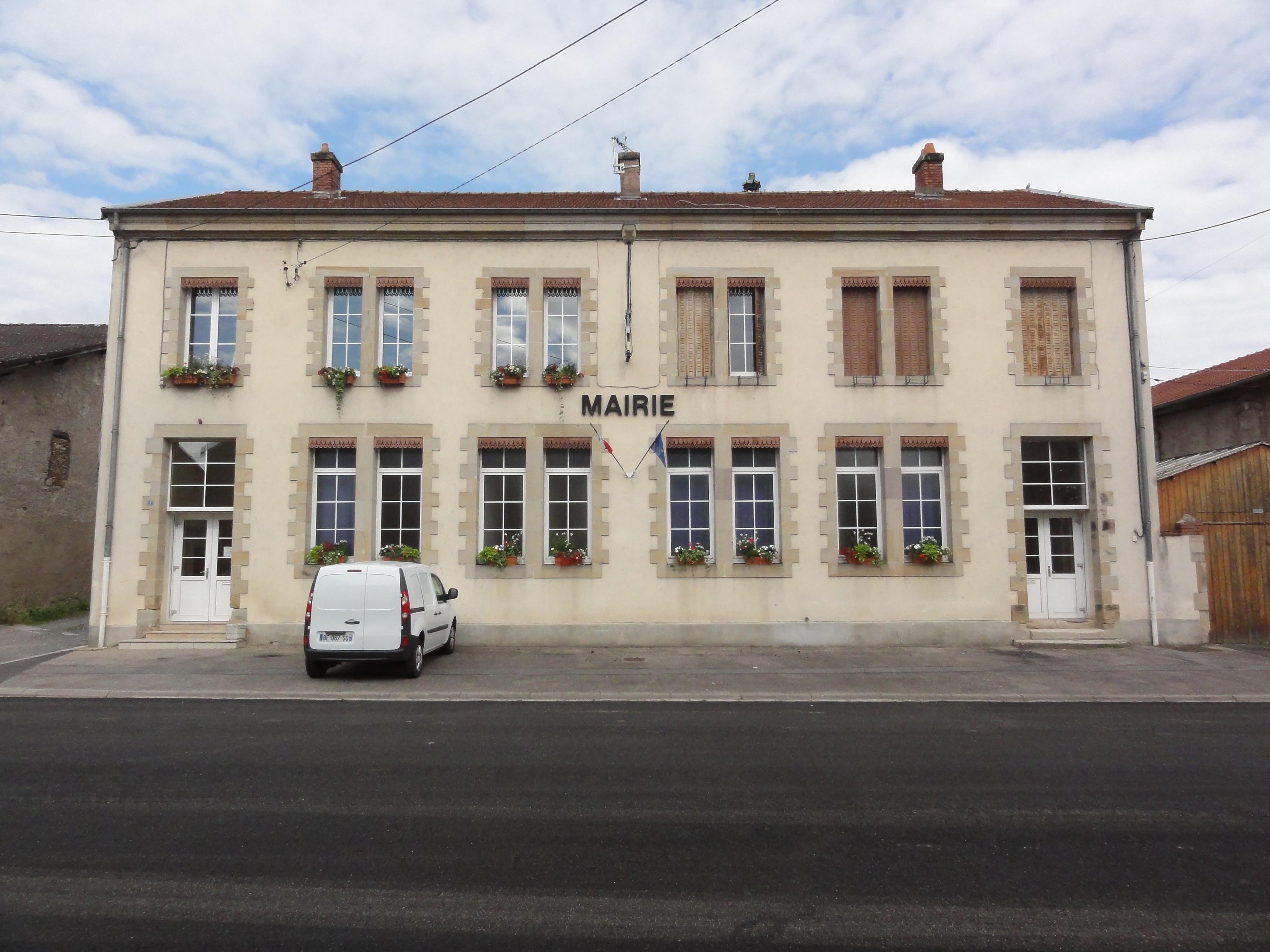 Croismare (M-et-M) mairie